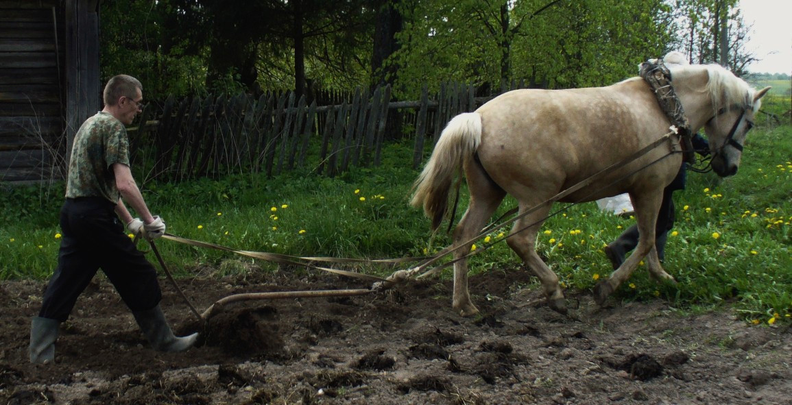 Работа с металлической сохой на посадке картофеля (Витебская область, 2008 год)